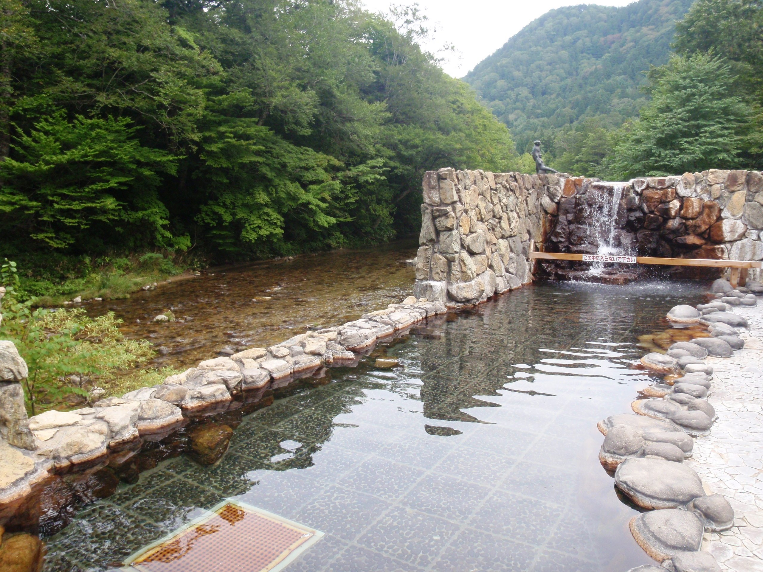 奥薬研温泉、夫婦かっぱの湯